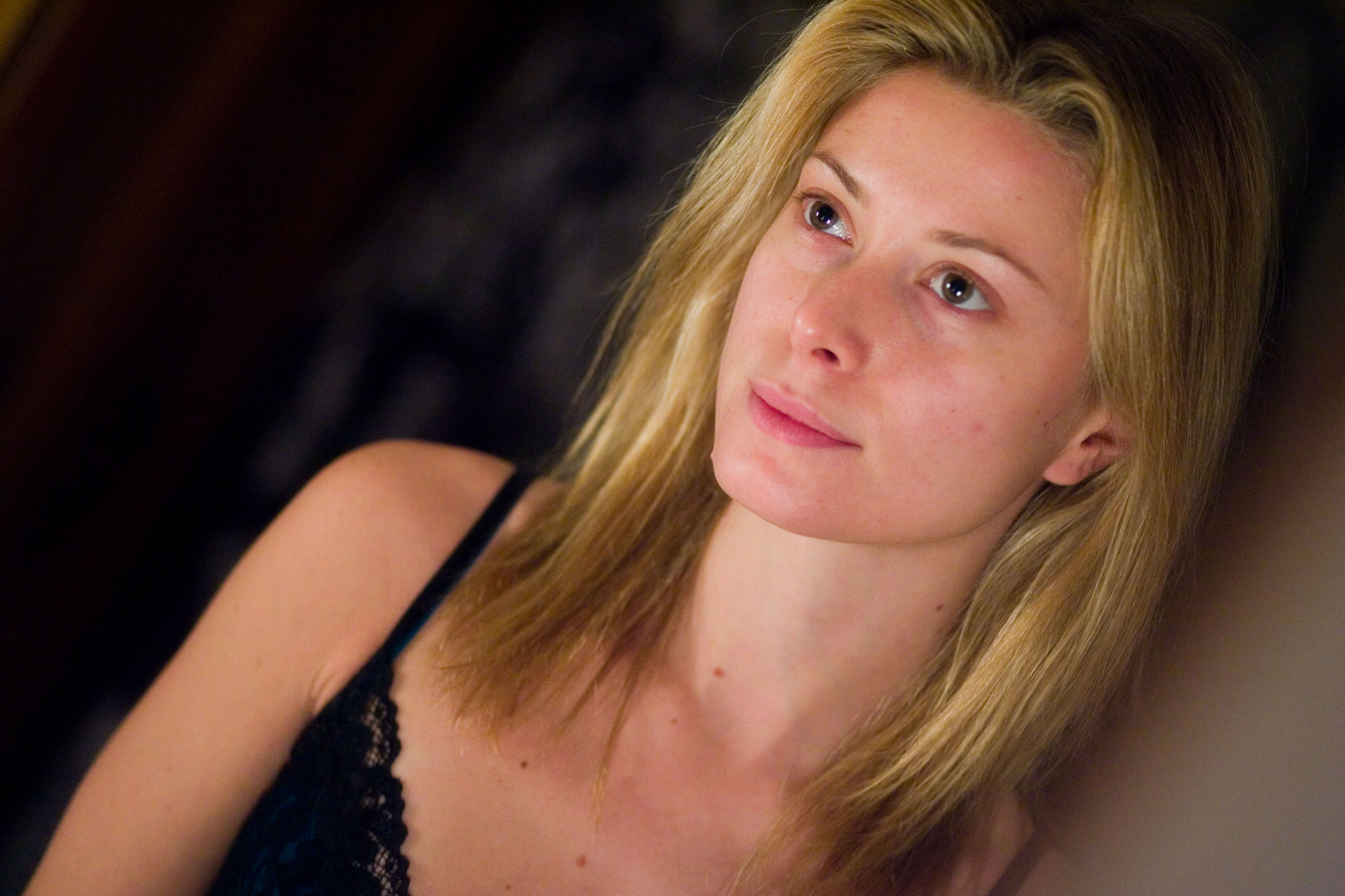 Euridice Axen - Gabriele Lavia e le "Memorie dal sottosuolo" di Dostoevskij